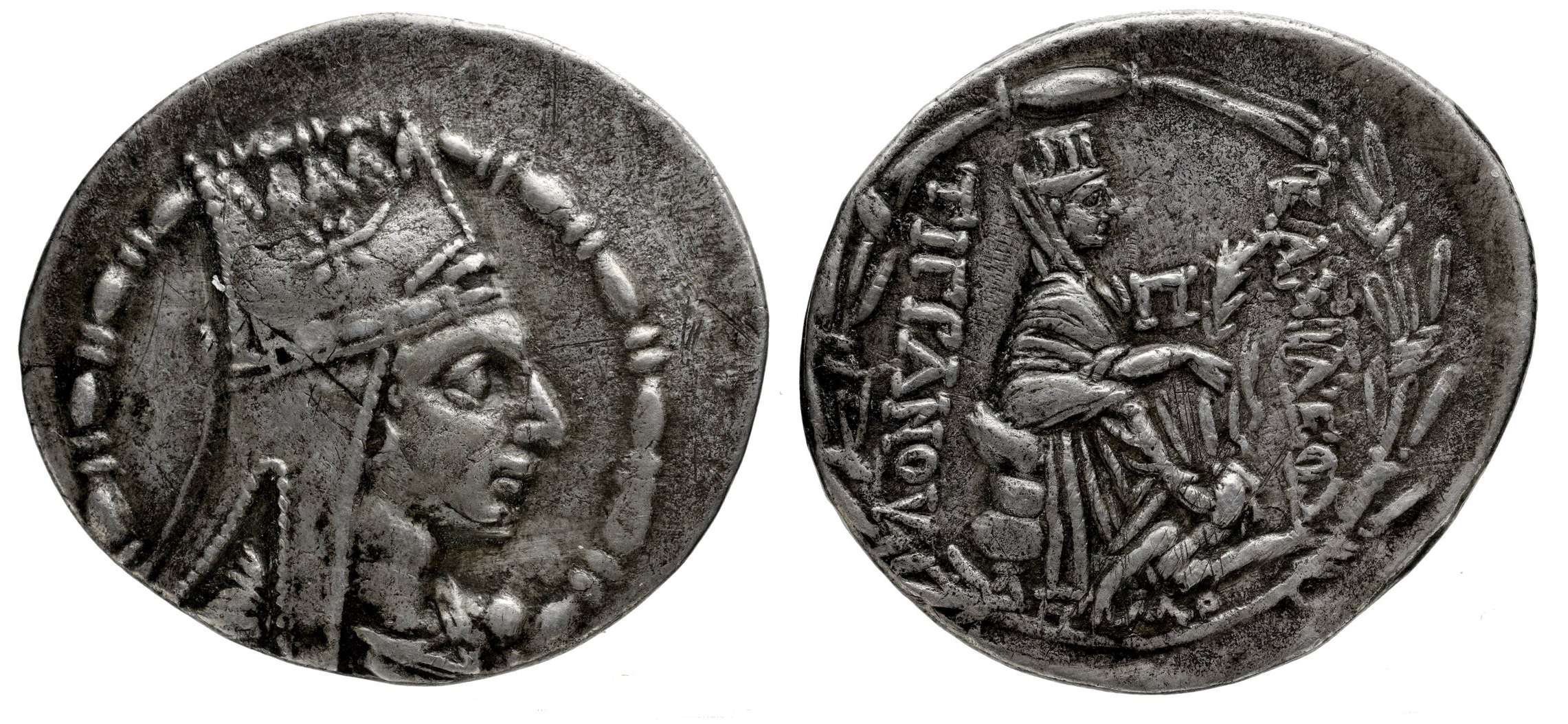 Title : [Monnaie : Tétradrachme, Argent, Damascus, Koïlé Syrie, Tigrane Le Grand] Author : Tigrane II (le Grand ; roi artaxiade d'Arménie). Autorité émettrice de monnaie Author : Damas (Koïlé Syrie ; atelier monétaire). Atelier monétaire Language : greek, ancient Format : 1 monnaie (15,92 g)